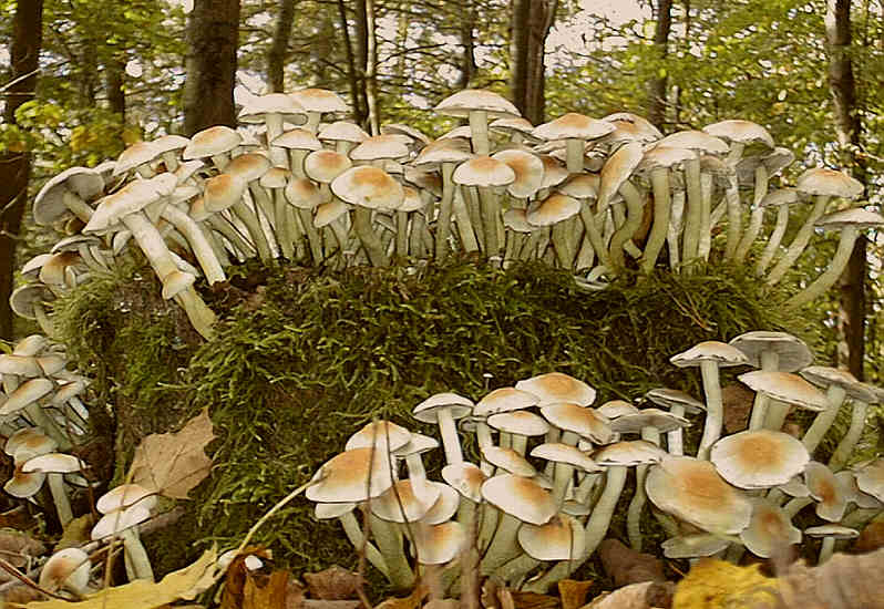 Grünblättriger Schwefelkopf (Hypholoma fasciculare) Fotograf: Walter J. Pilsak, Waldsassen Copyright Status: GNU Freie Dokumentationslizenz